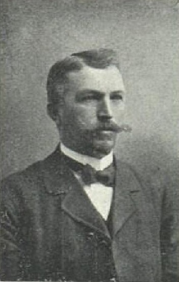 Josef Sochor (1865-1929), rakouský a český politik